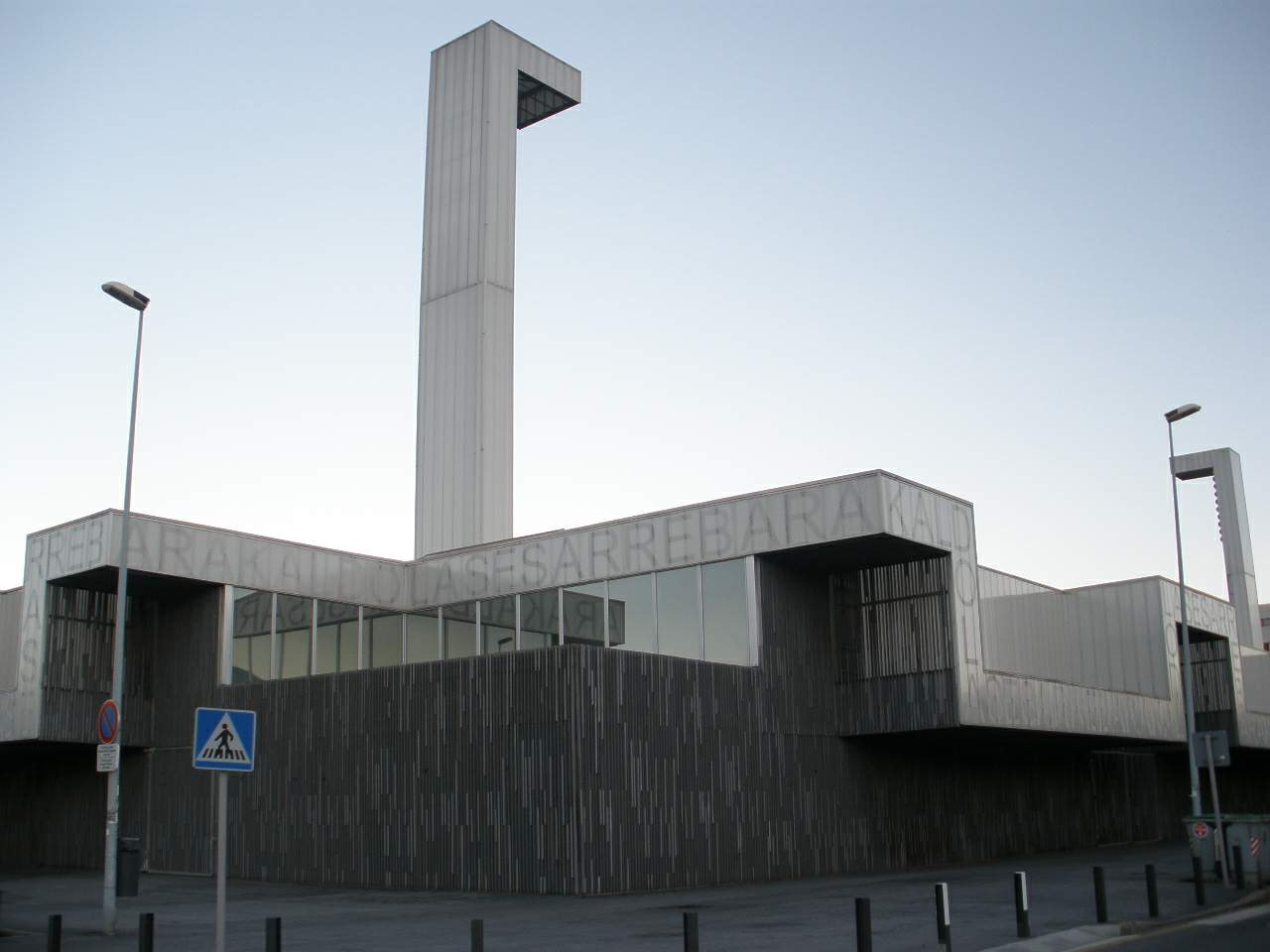 Estadio de Lasesarre (Barakaldo)